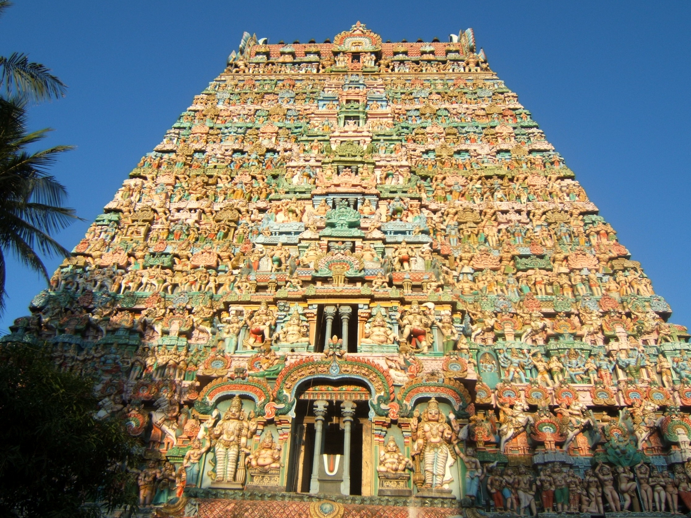 Sarangapani_Vishnu_temple in Kumbakonam, Tamil Nadu, India